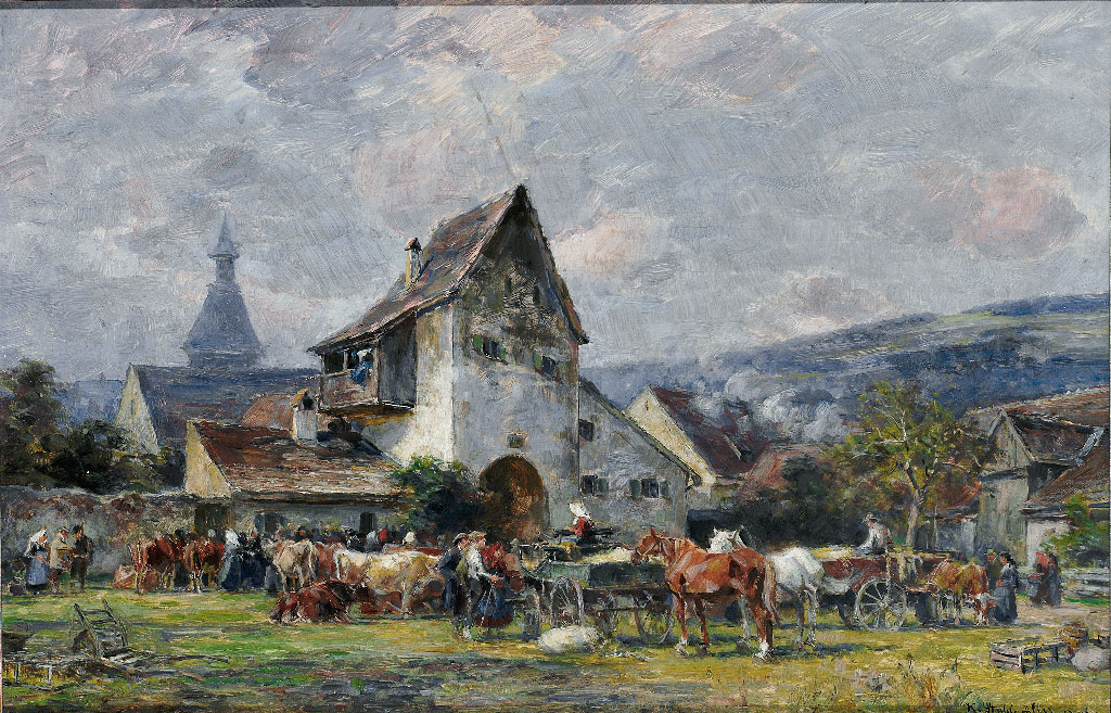 Karl Stuhlmüller (1859–1930): Lebhaftes Treiben auf dem Viehmarkt vor den Toren einer kleinen Kreisstadt an einem herbstlichen Tag. Öl/Holz. 39,5 x 60 cm